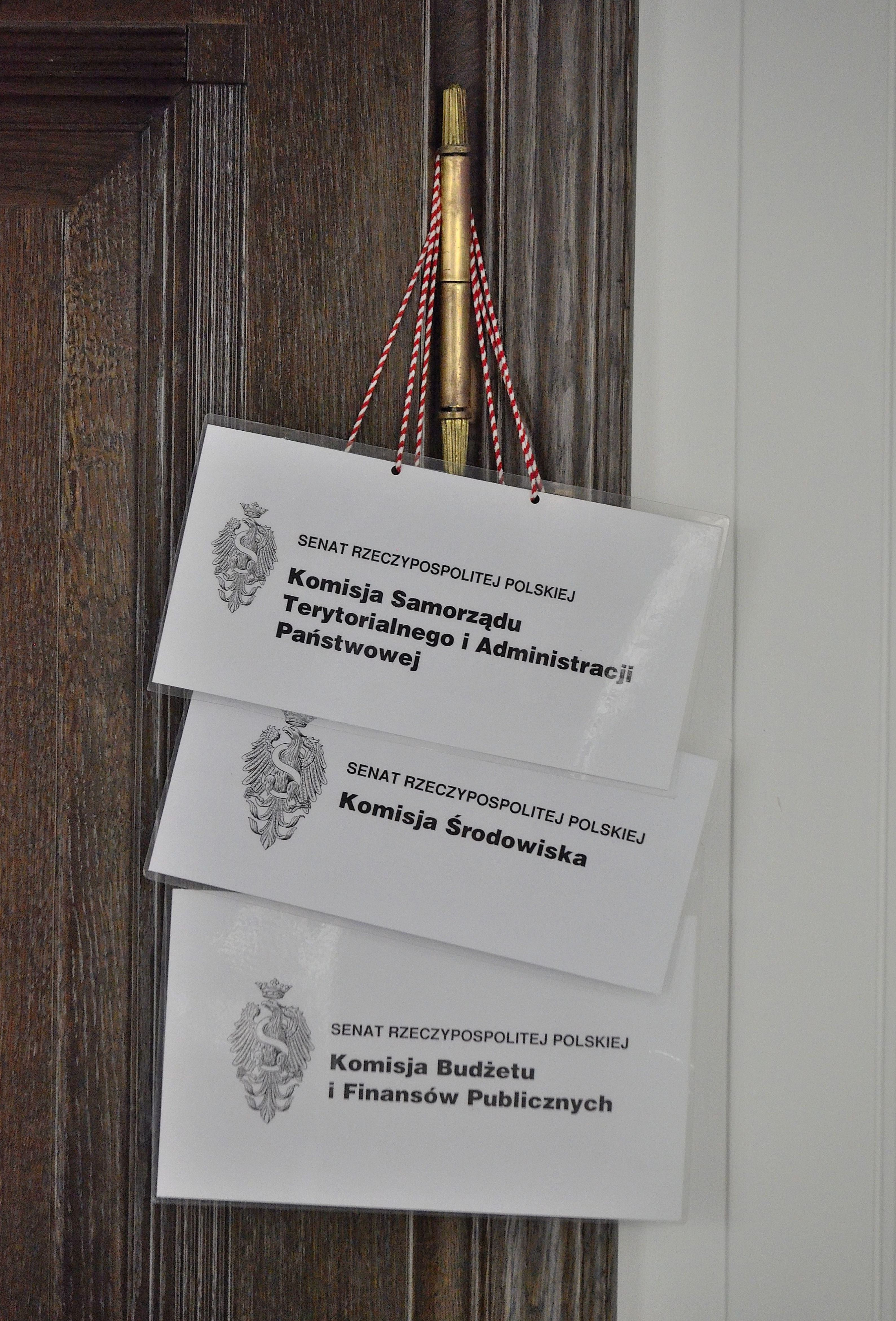 Wywieszki o obradujących komisjach senackich w Sali Posiedzeń Senatu